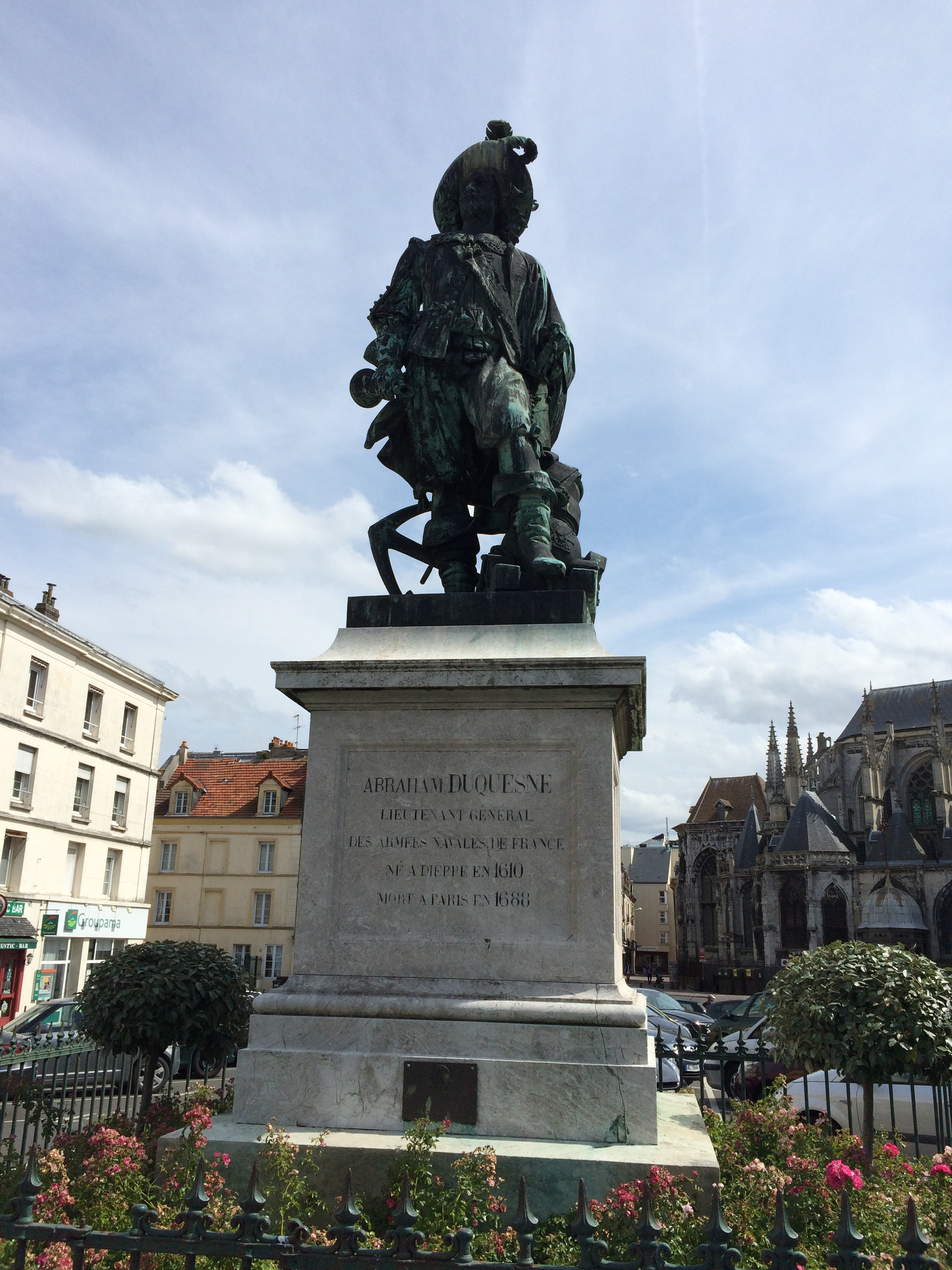 Oeuvre de Antoine Laurent Dantan